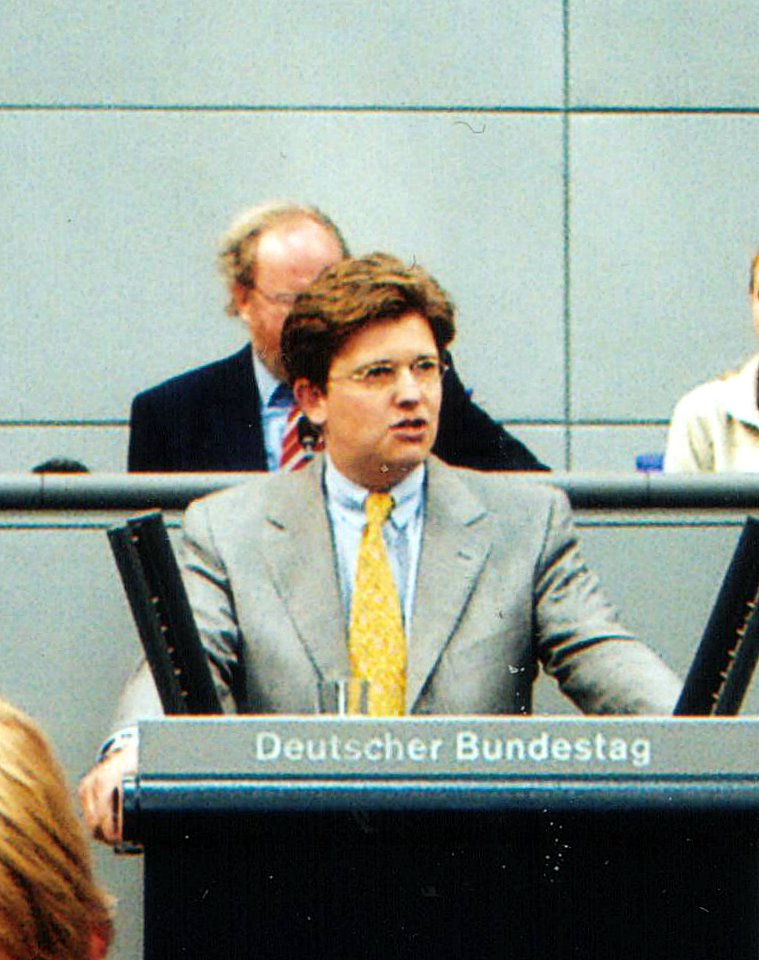 Eckart von Klaeden während einer Rede im Deutschen Bundestag.